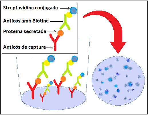 Exemple de procediment d'un assaig ELISPOT